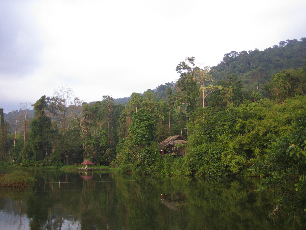 See und Campingplatz unterhalb des Krating Waterfall